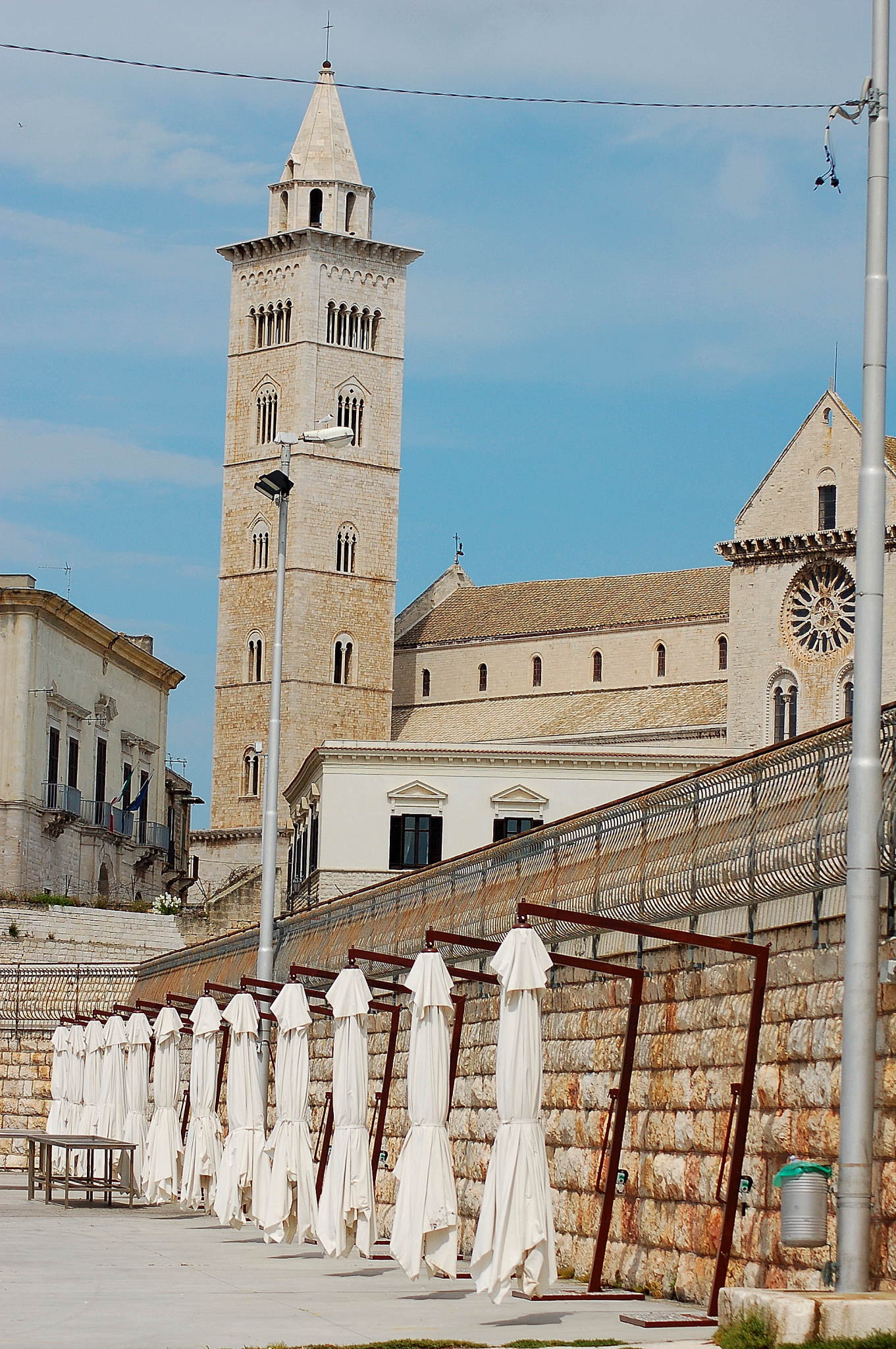 Trani,PUGLIA, Italia